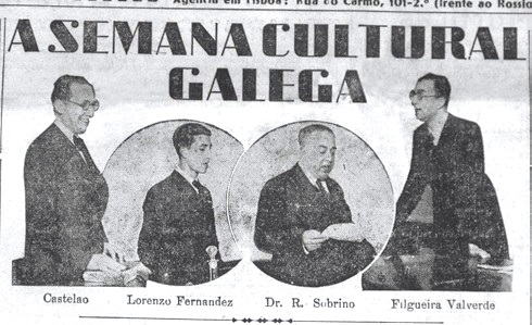 Semana Cultural Galega de 1935 no Porto, O Primeiro de Janeiro